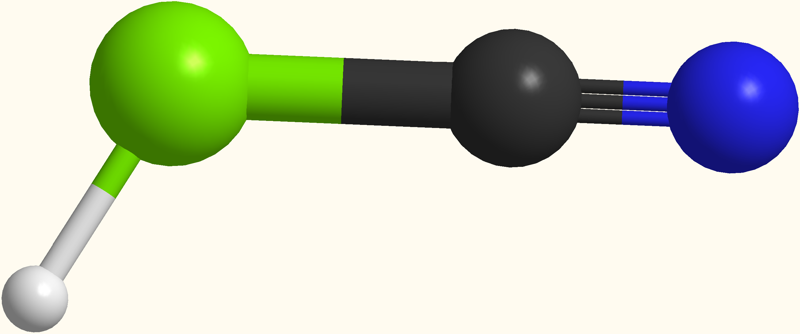 Изображение роданистоводородной кислоты